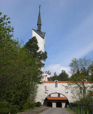 Straszyn - rzymskokatolicki kościół parafialny p.w. św. Jacka Odrowąża